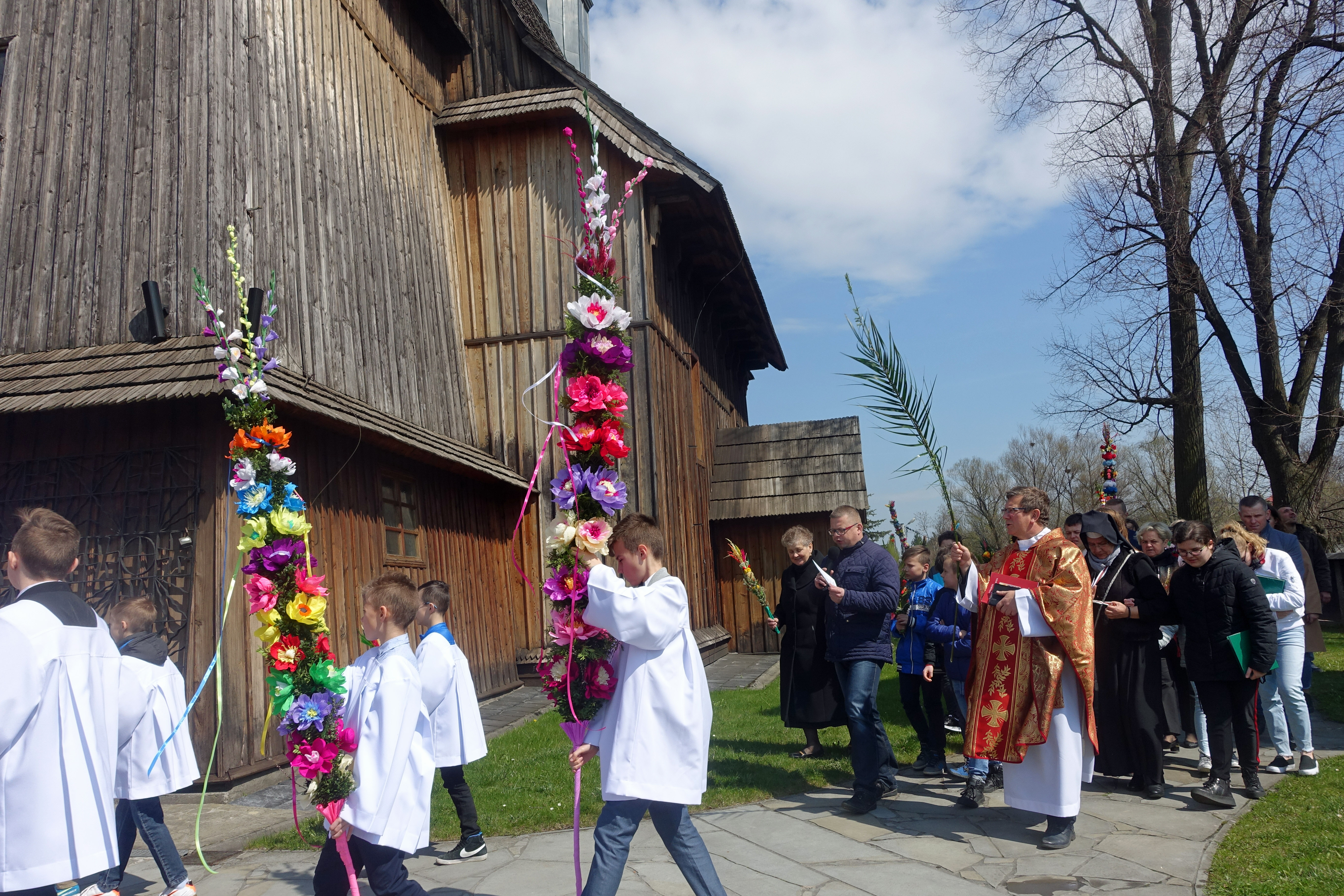 Procesja w Niedzielę Palmową 2019 przy kościele Narodzenia Najświętszej Maryi Panny w Racławicach (gmina Jerzmanowice-Przeginia, pow. krakowski)